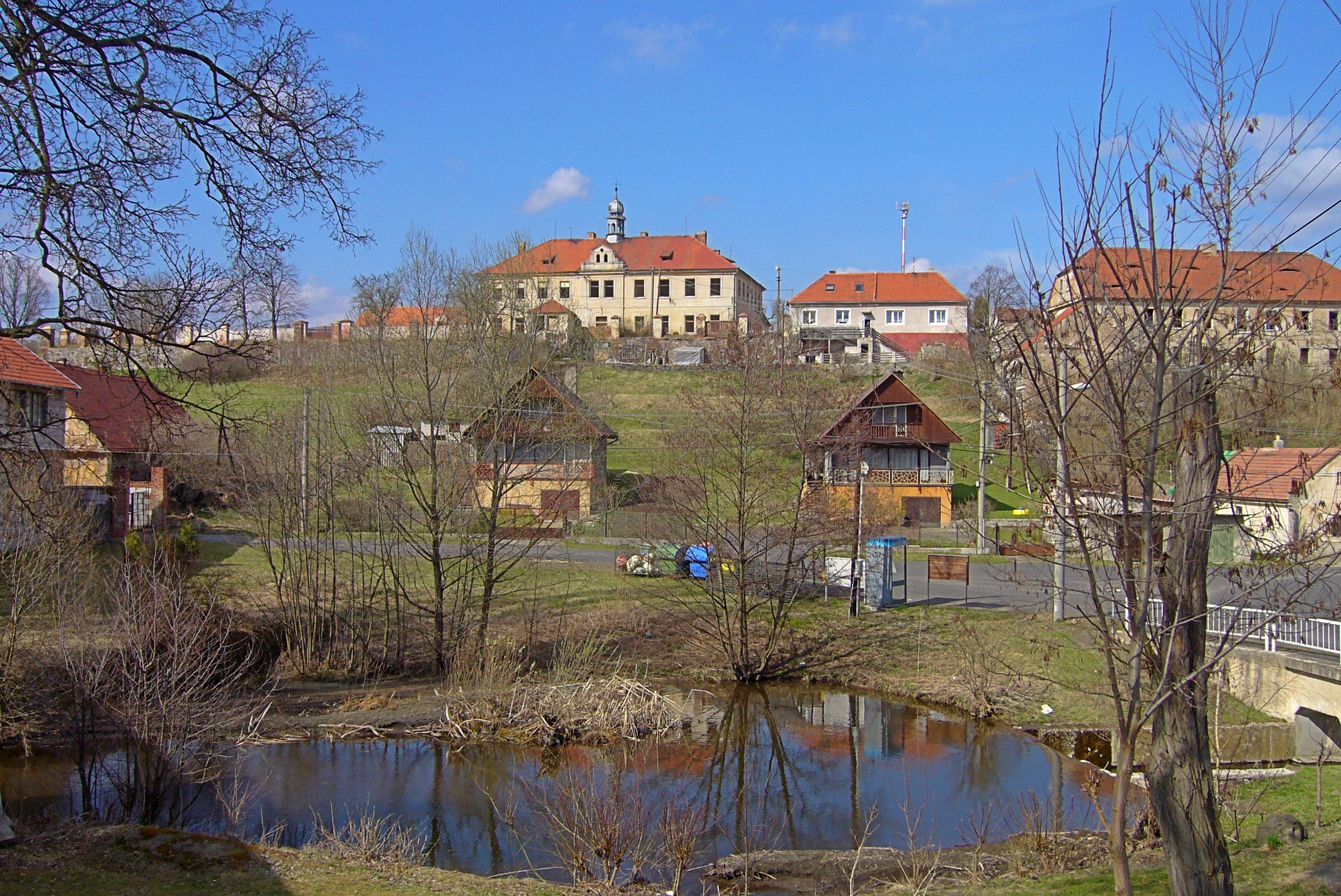 Střed vesnice se zámkem Brody (Krásný Dvůr).